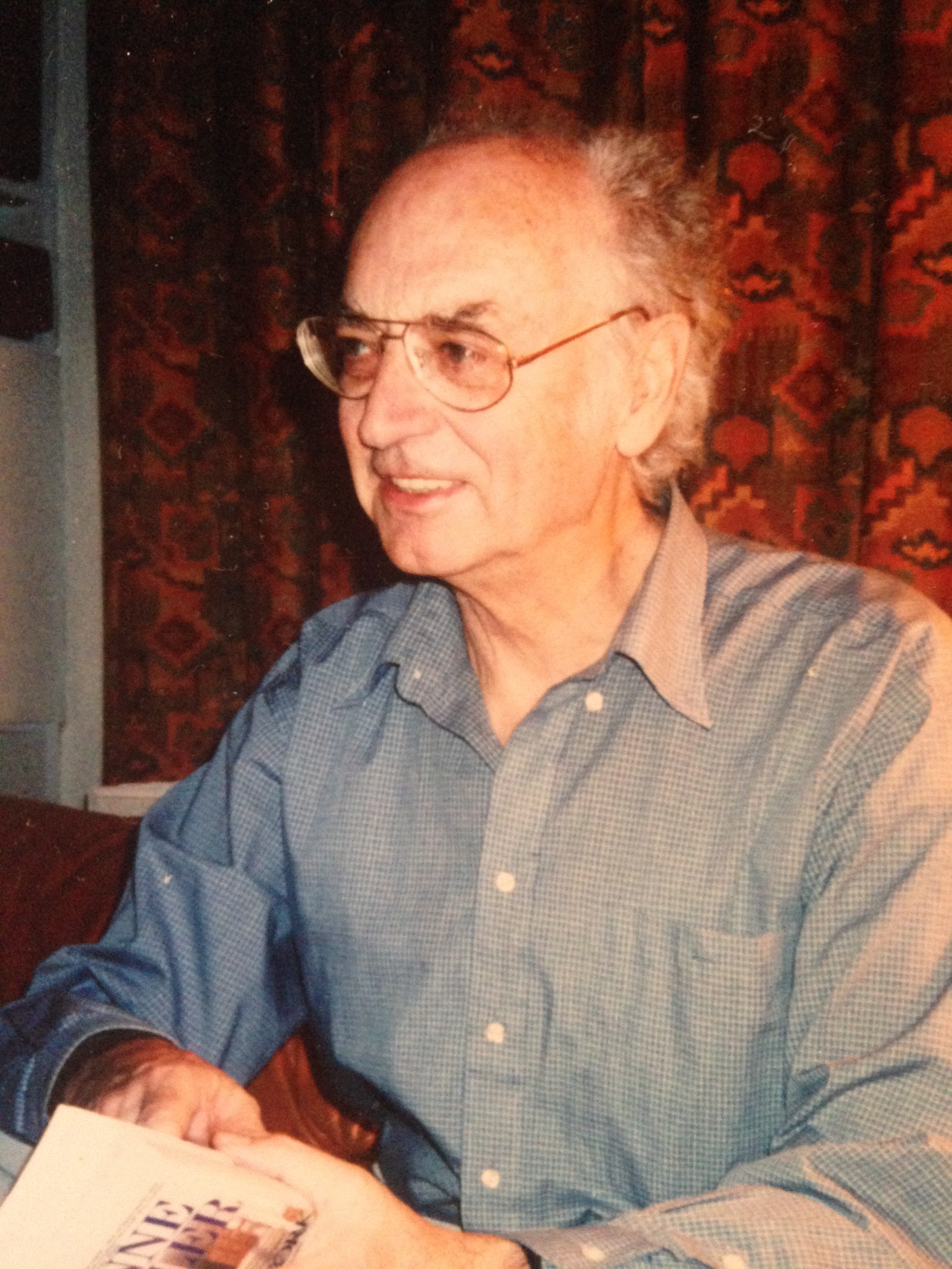 Foto van mijn grootvader op nieuwjaarsfeest.